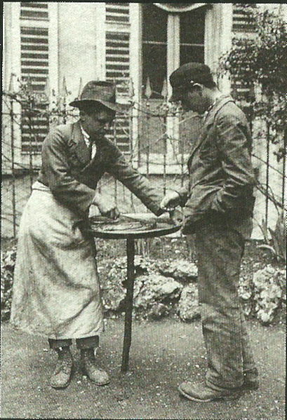 Autore:anonimo Fonte:civico archivio fotografico Milano Descrizione: Milano, 1920, venditore ambulante di castagnaccio a porta Nuova Licenza d'uso:foto non artistica scattata in Italia oltre 20 anni fa